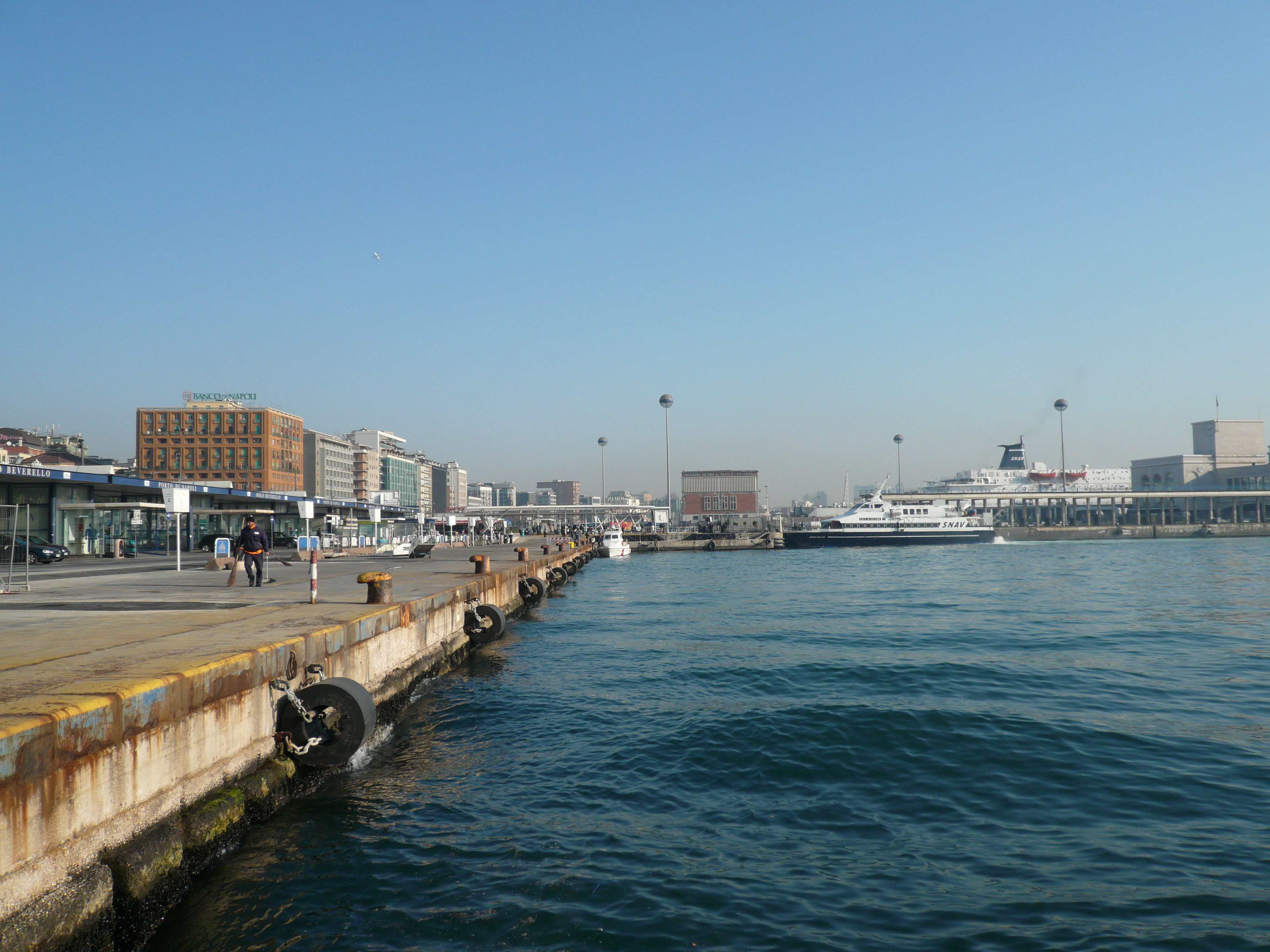 banchina d'attracco degli aliscafi del Molo Beverello Autore foto: Roberto De Martino